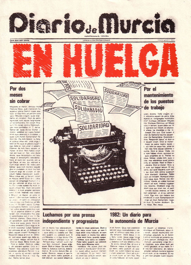 Cuartilla elaborada con motivo huelga